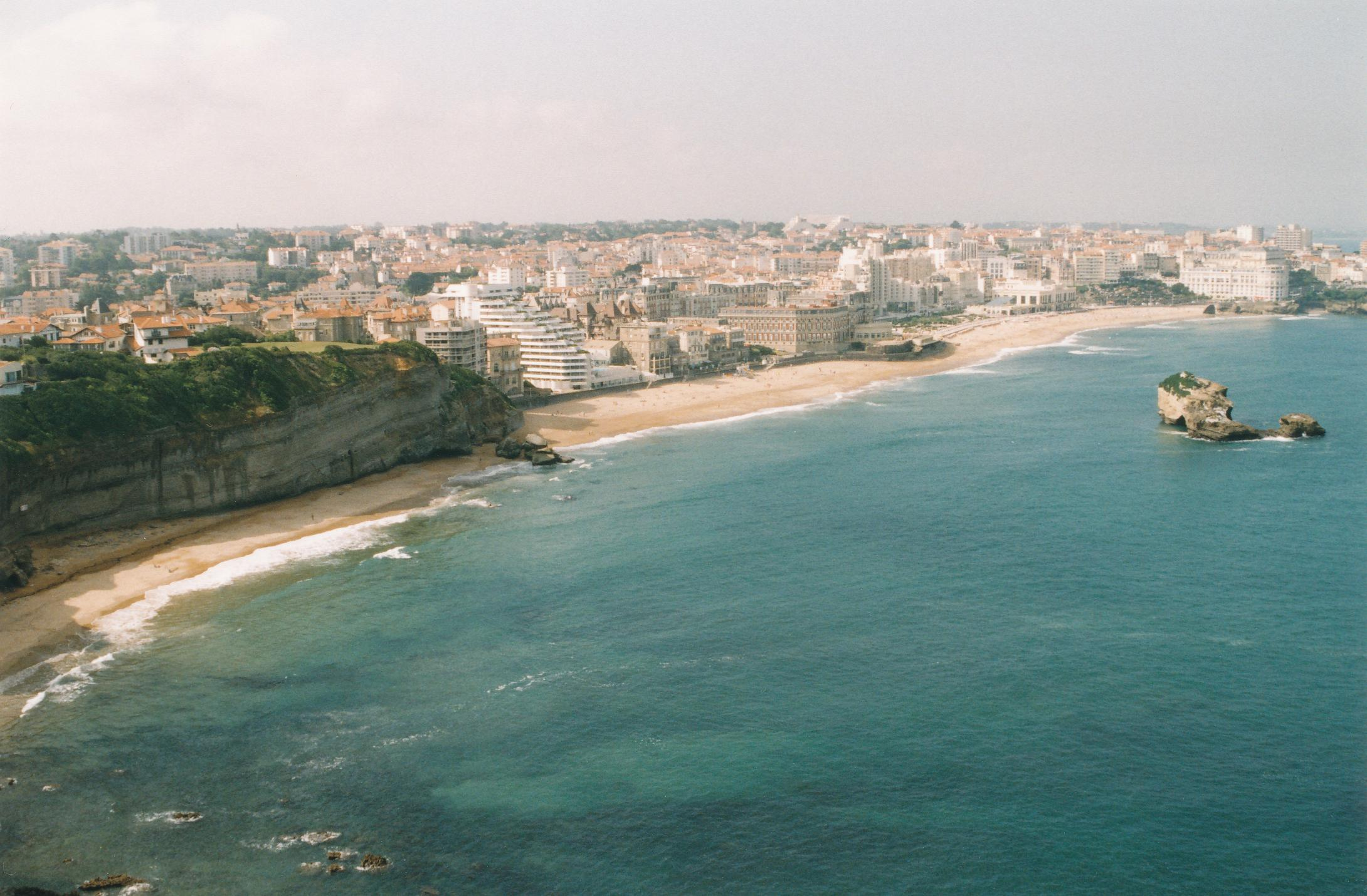 Biarritz - Panoramablick (vom Leuchtturm) Datum: 06/1999 Urheber: Michael Pfeiffer Quelle: privates Fotoalbum des Urhebers